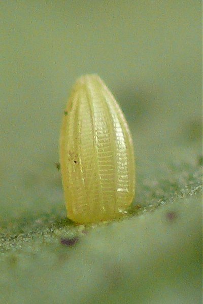 Ei des Kleinen Kohlweißlings (Pieris rapae)